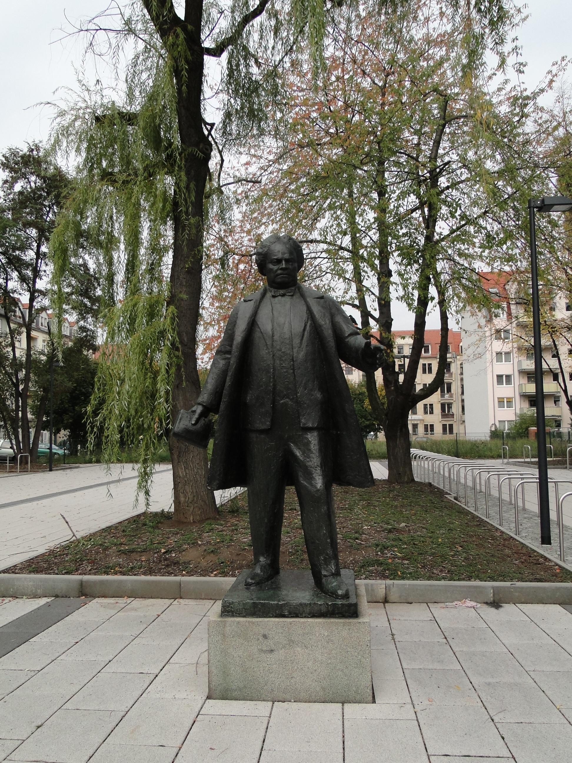 Skulptur Martin Andersen Nexös von Rudolf Löhner vor der MANOS in Dresden